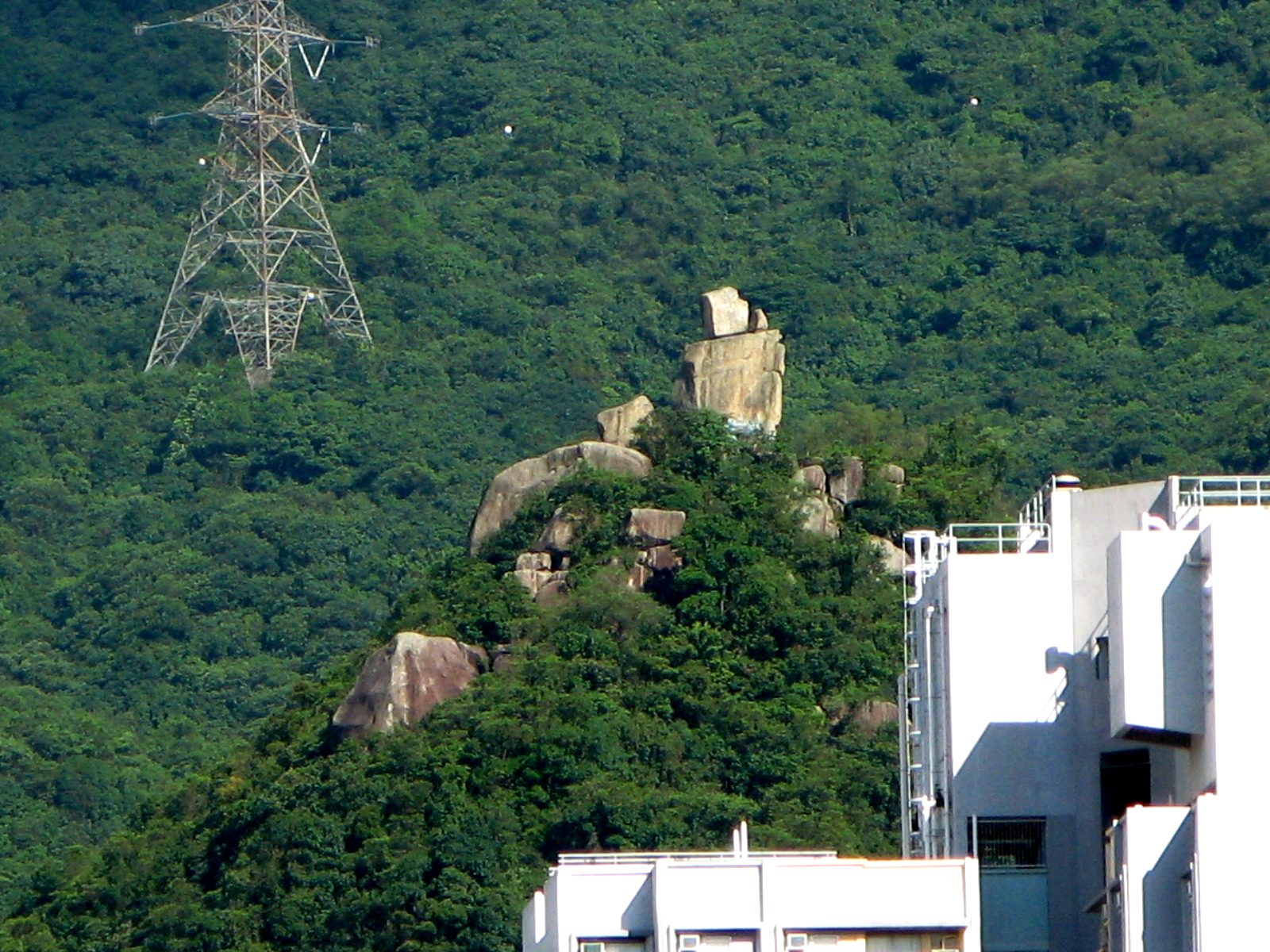 HK Amah Rock 望夫石